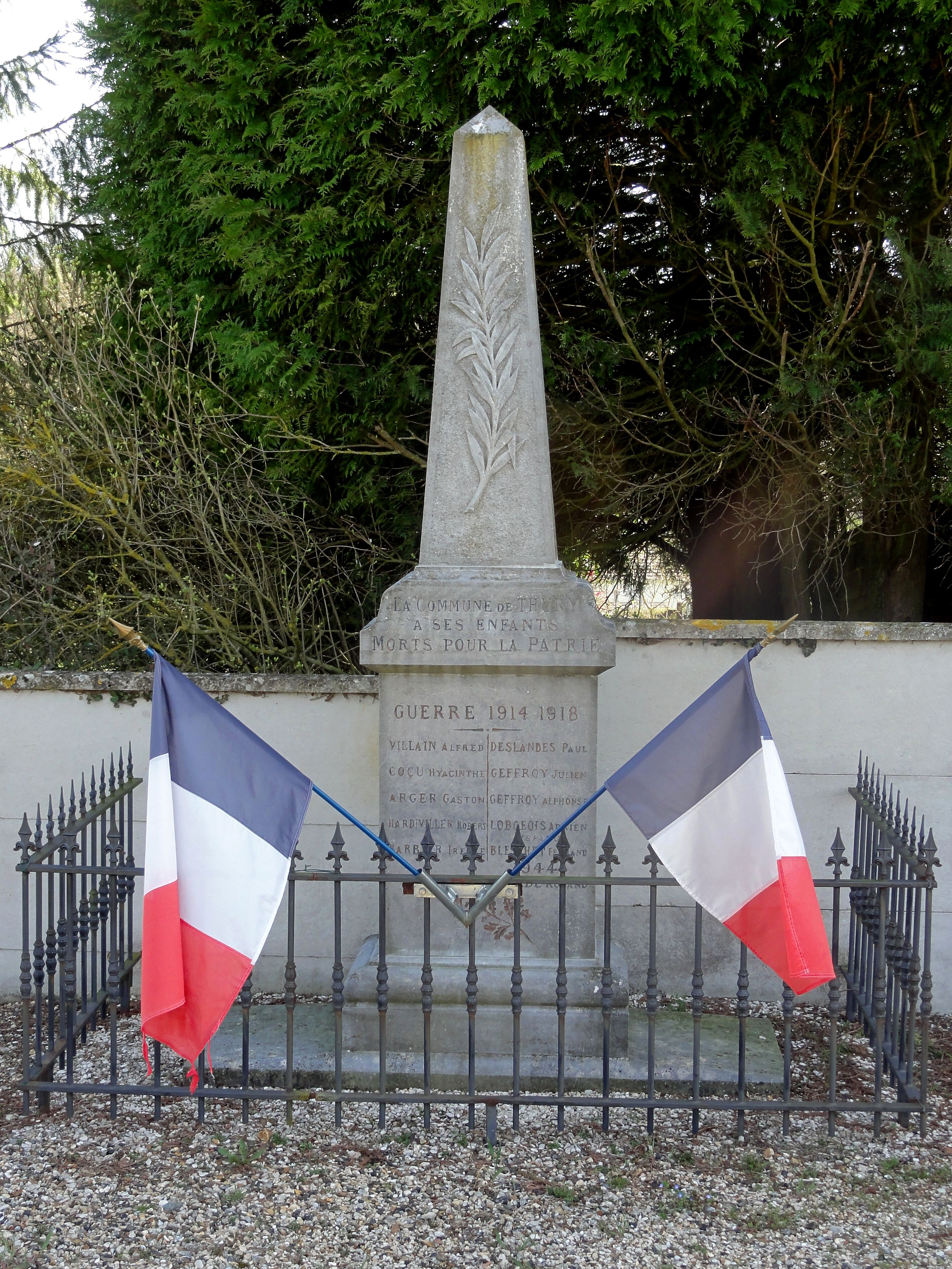 Monument aux morts, au cimetière.